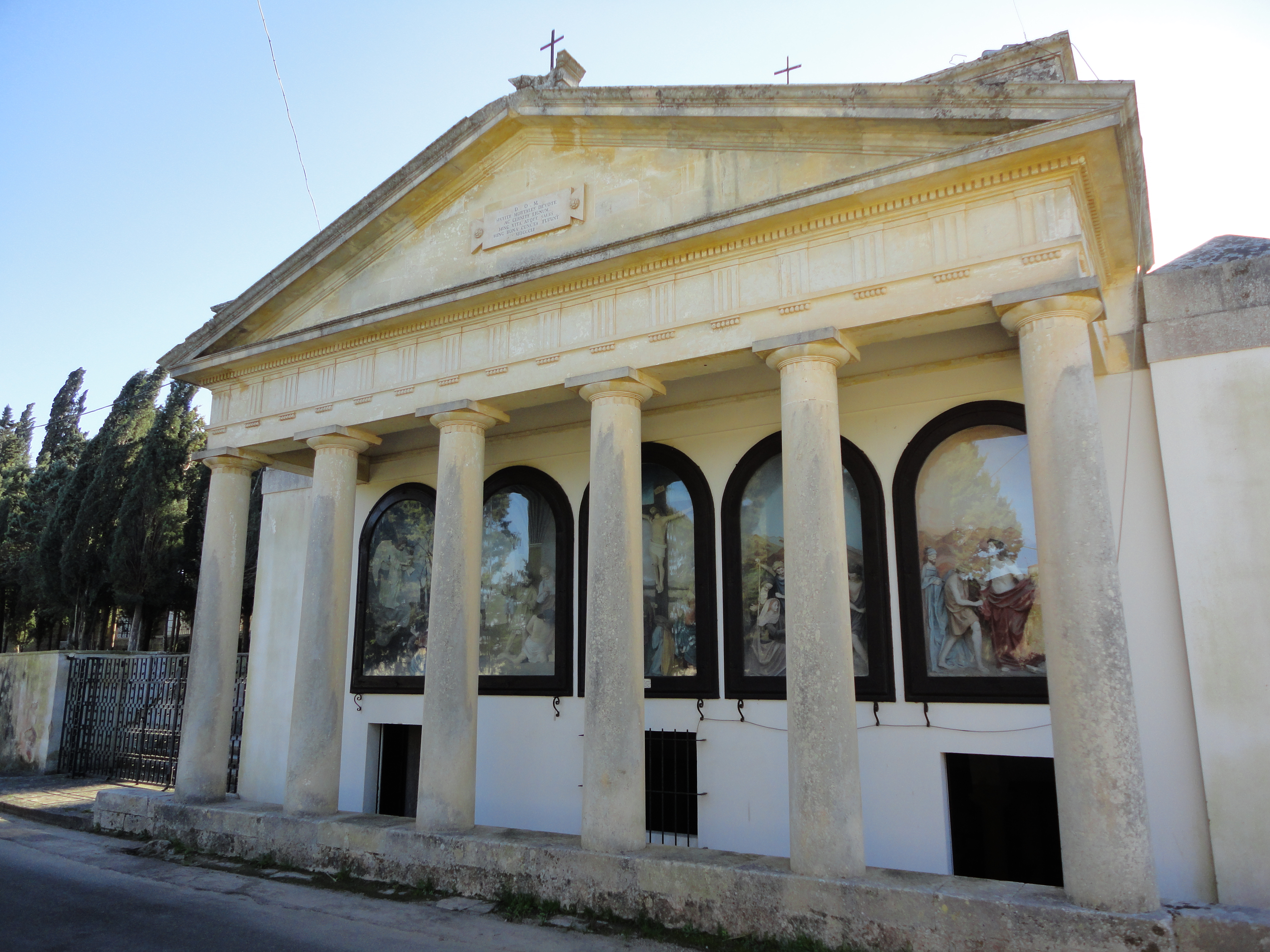 Chiesa Madonna del Passo Specchia, Lecce